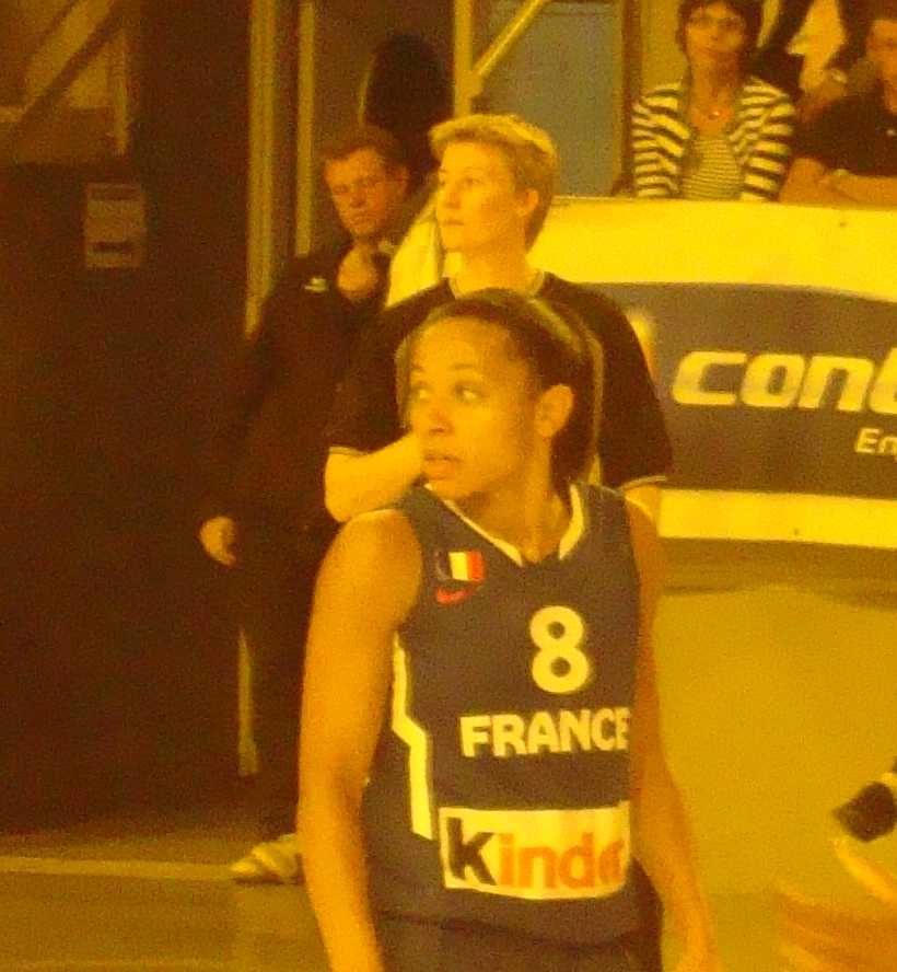 La basketteuse française Edwige Lawson-Wade